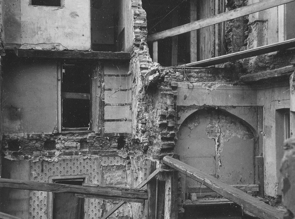 Rivningar i kvarteret Cygnus